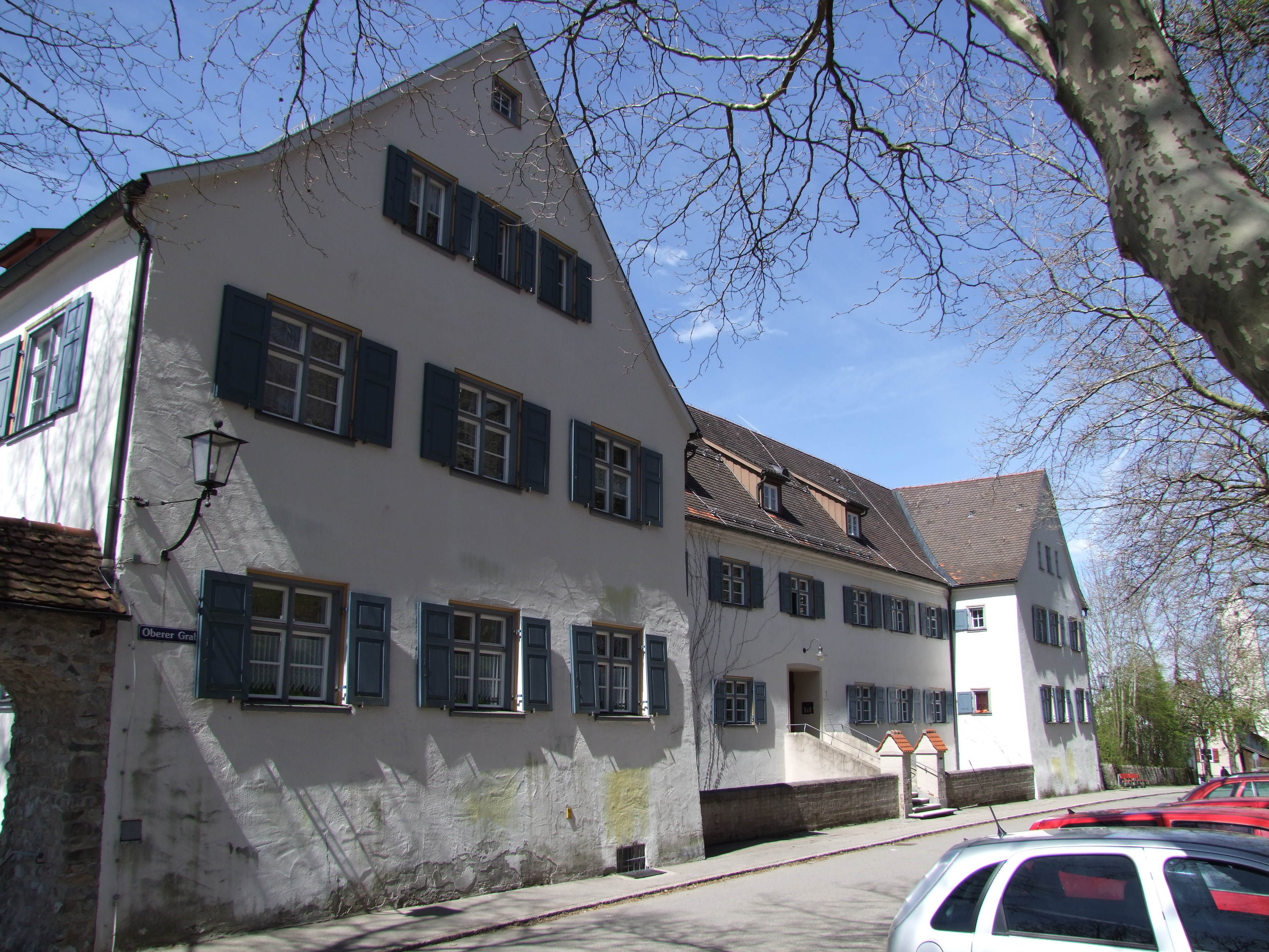 Das ehemalige Franziskanerinnenkloster in Leutkirch